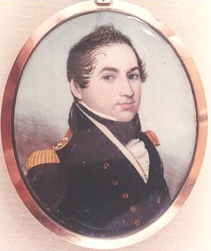 John Pasco circa 1805